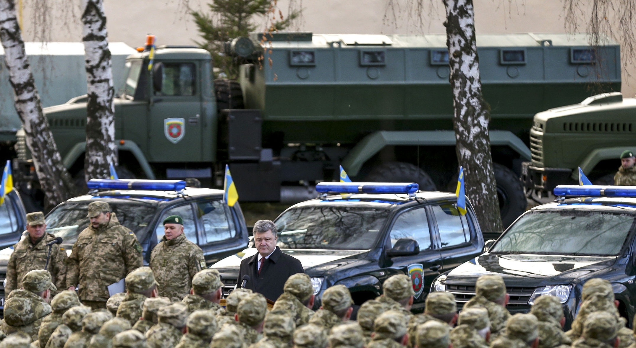 Рабочая поезда президента Порошенко во Львовскую область, 14 ноября 2015 г. На заднем плане бронированный автомобиль КрАЗ Форпост Государственной пограничной службы Украины.